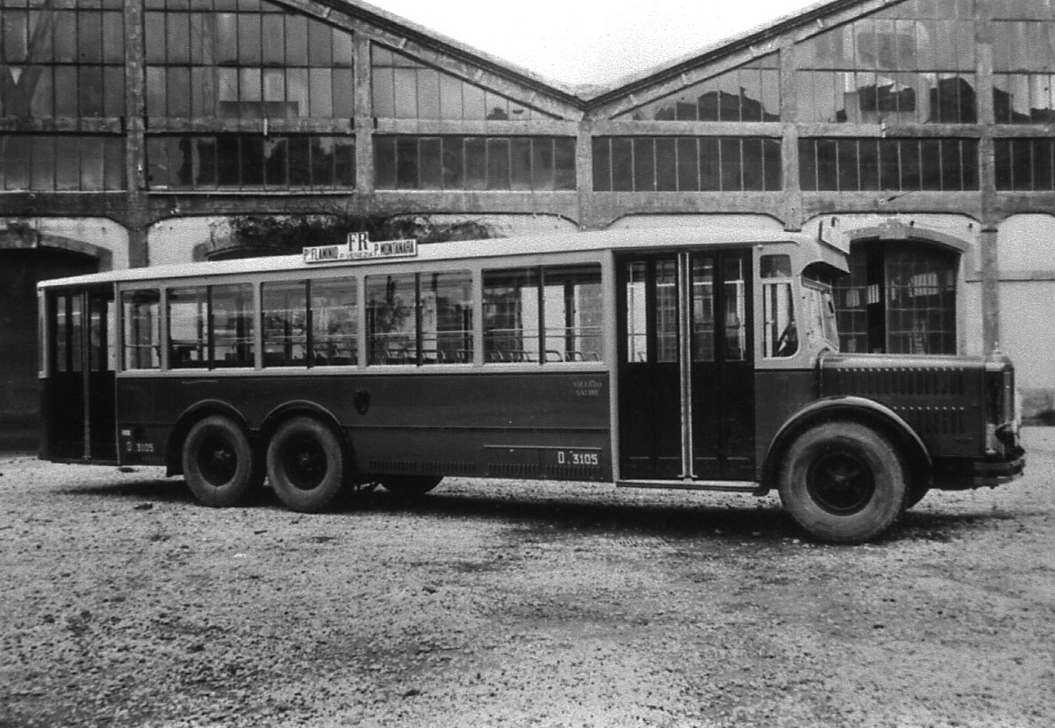 Autobus Alfa Romeo 110A di Roma